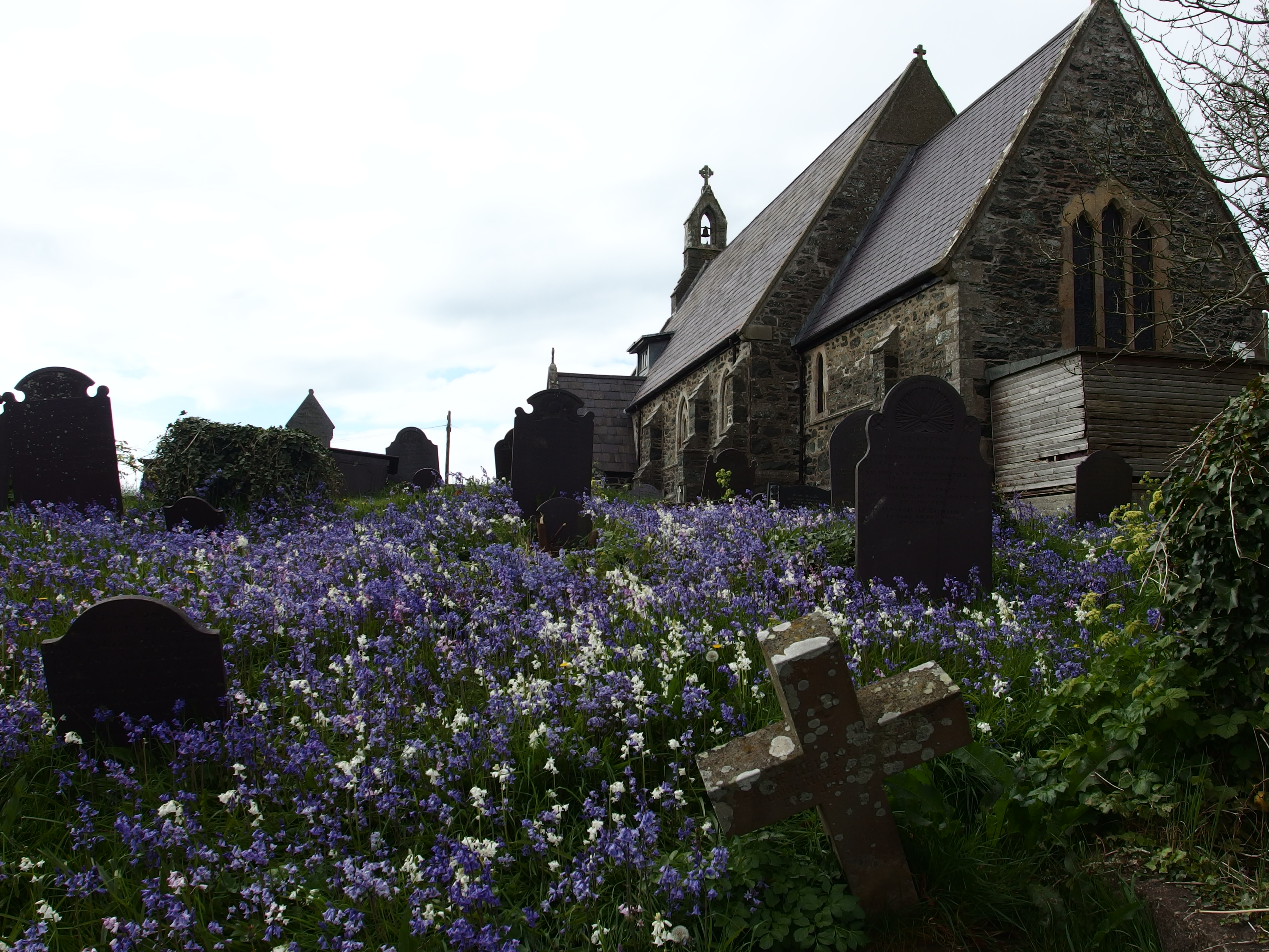 Eglwys Llanfaelog